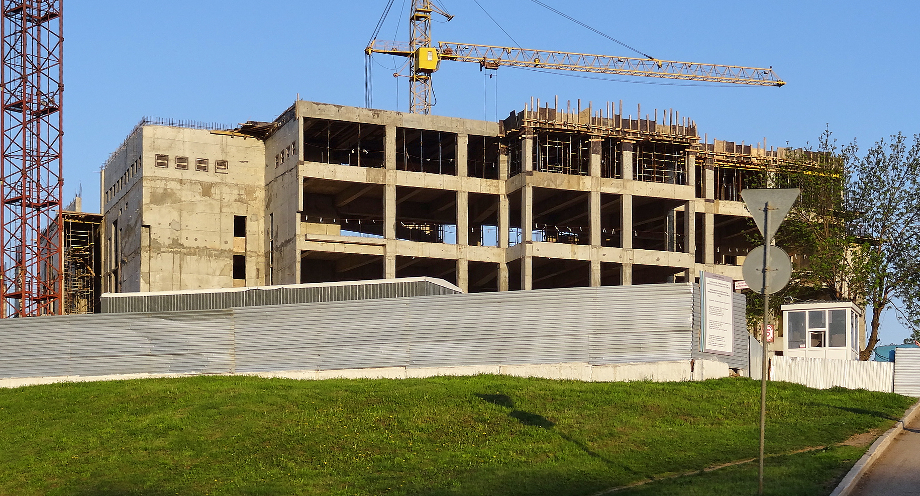 Строительство мечети Салавата Юлаева